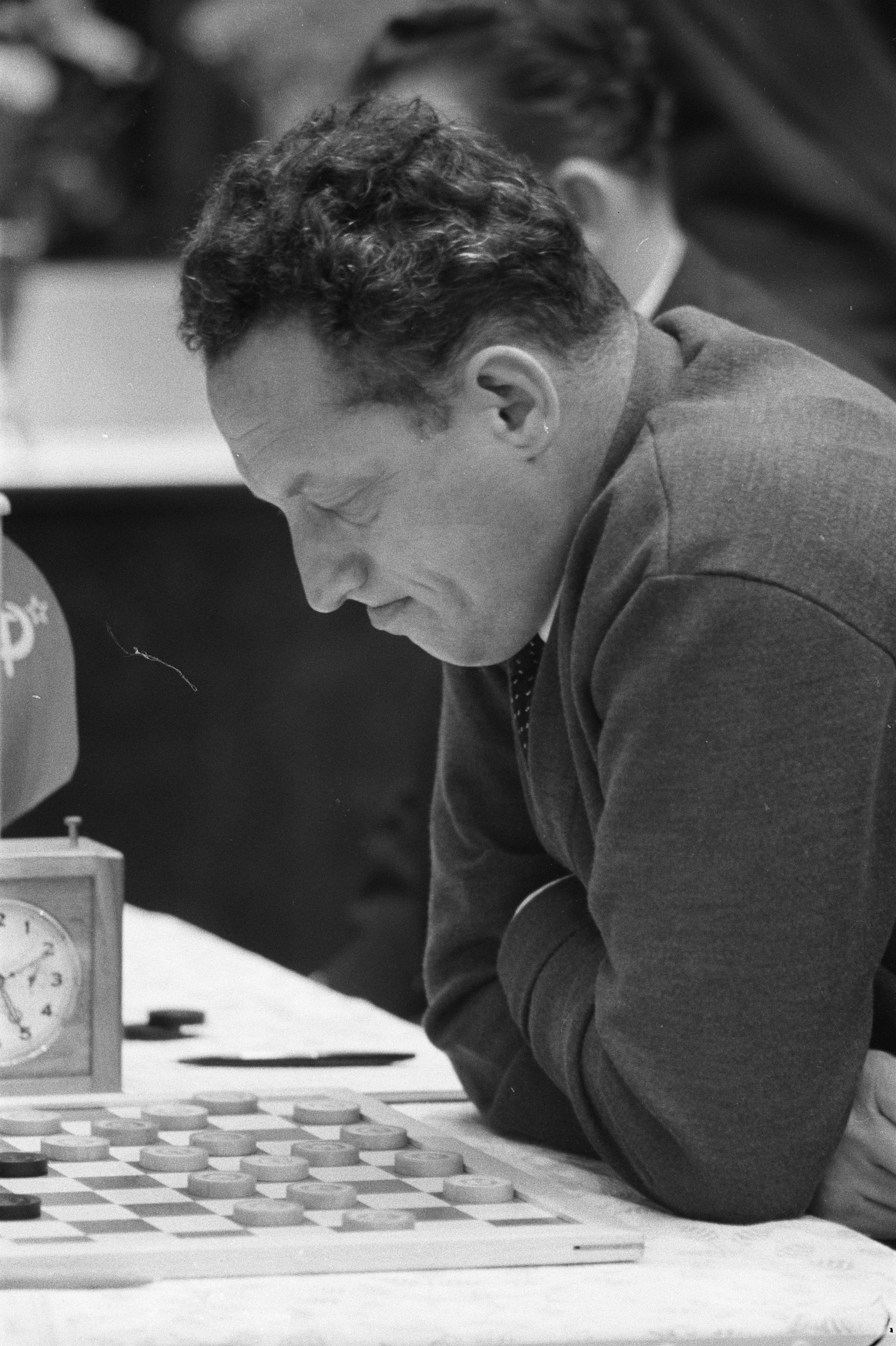 Wereldkampioenschap dammen te Amsterdam, Koeperman